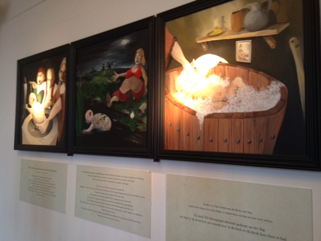 Tijl Uilenspiegel: doop. Tijl Uilenspiegel werd 3 maal gedoopt.